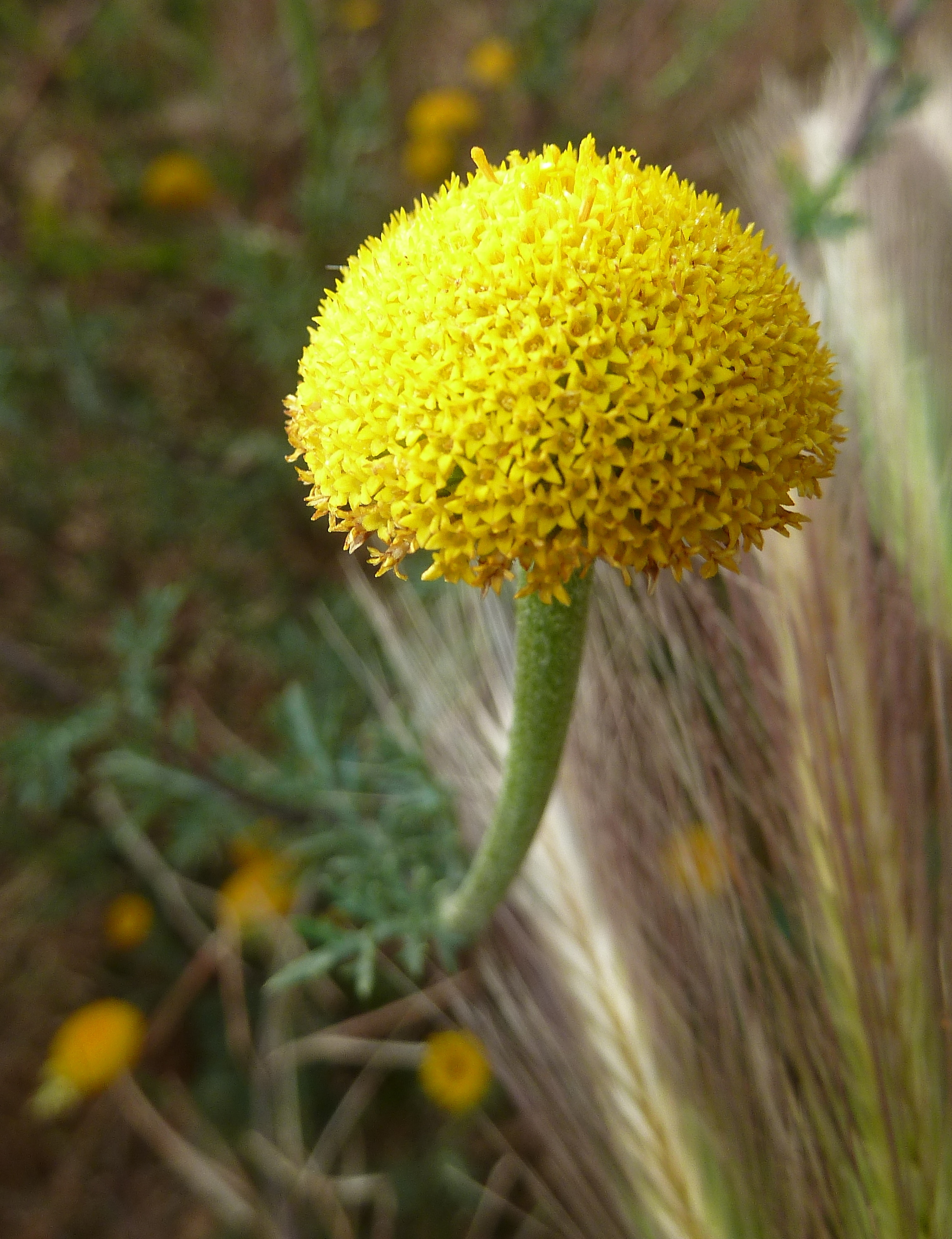 Anacyclus valentinus (magarza valenciana) - Capítulo, vista lateral - Carretera de San Isidro (CV-909), Albatera (Alicante, España).